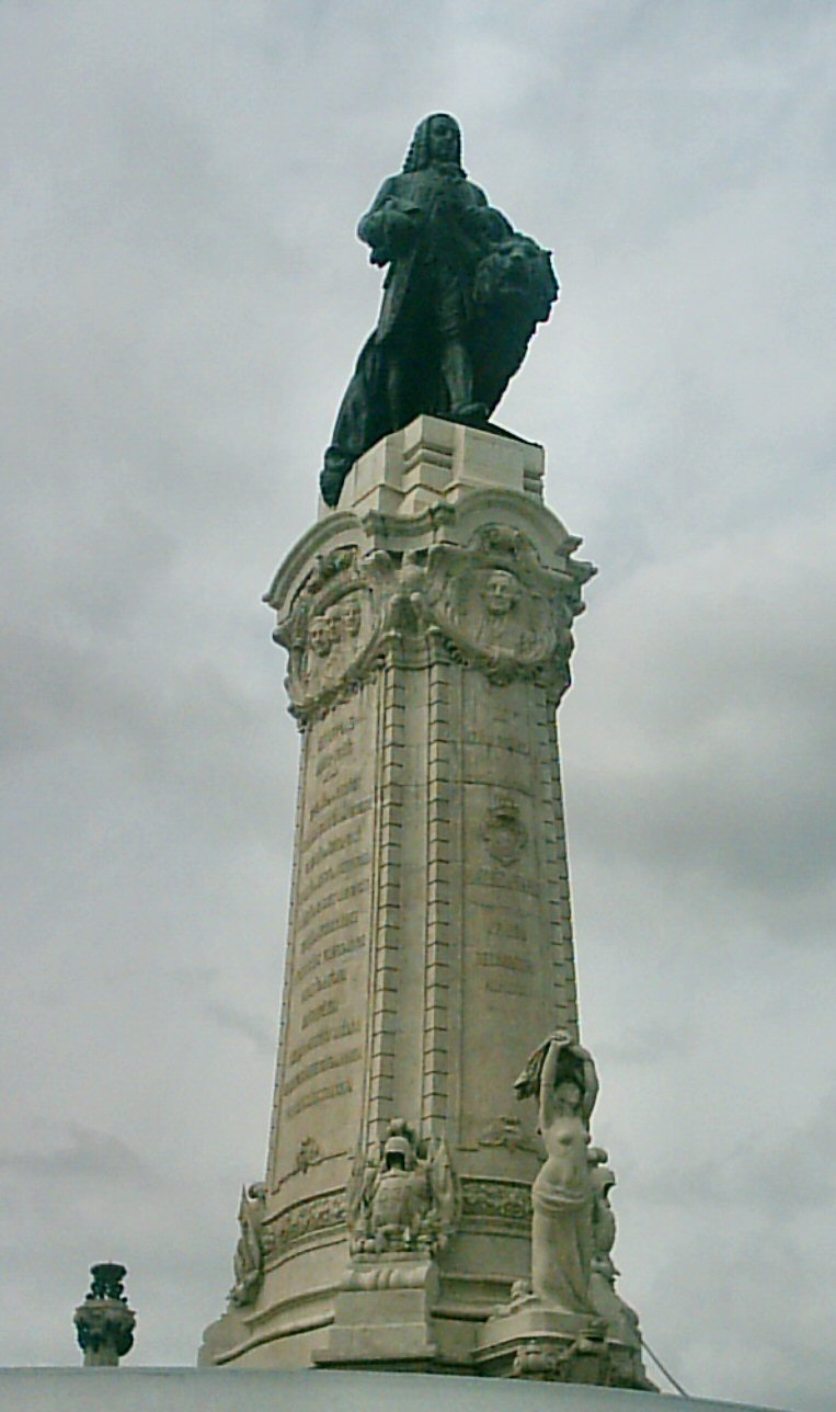 Estátua do Marquês de Pombal em Lisboa, Portugal